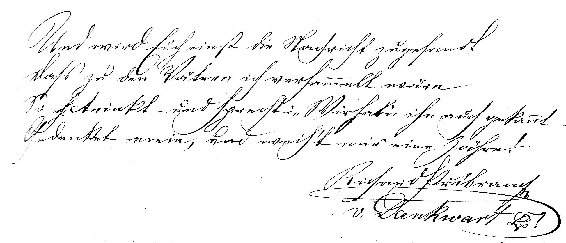 Schriftprobe von Richard Pribram (Eintrag im Gästebuch des Corps Austria, Prag, am 23. Februar 1864)